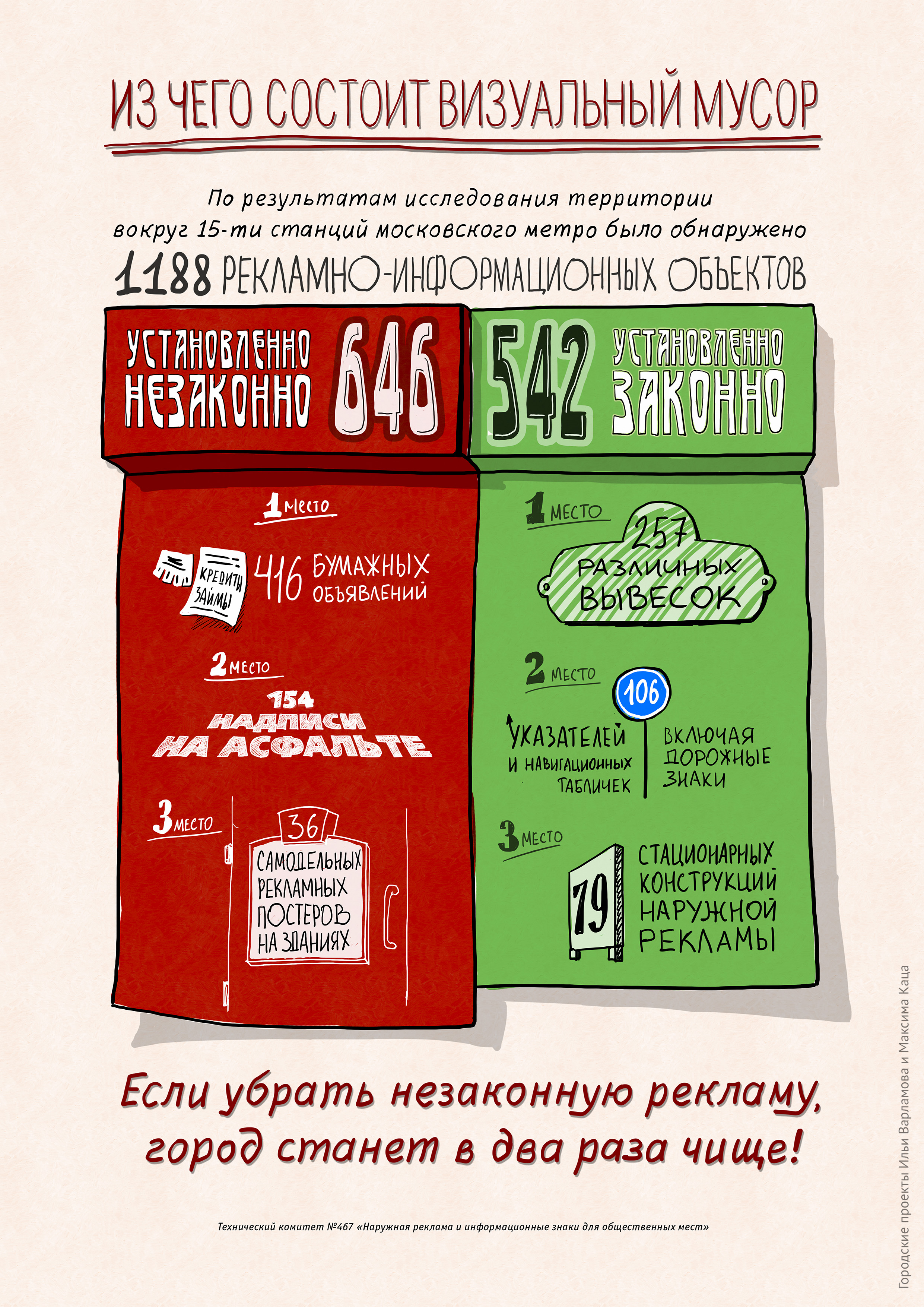 «Визуальный мусор» — иллюстрация для «Городских проектов» Ильи Варламова и Максима Каца. Настоящим я, Евгений Решетнёв, заявляю, что являюсь законным владельцем этого изображения: Я доверяю загрузку на сервер wikimedia и проведение лицензирования этого изображения участнику kf8. Я согласен опубликовать данное изображение, на условиях свободной лицензии cc-by-3.0 или любой более новой, опубликованной Фондом Свободного Программного Обеспечения (Free Software Foundation). Я понимаю, что тем самым даю право любому лицу распространять, изменять и использовать загруженные на сервер wikimedia материалы в любых законных целях (в том числе связанных с извлечением коммерческой выгоды) при условии соблюдения указанной лицензии. Я уведомлён, что я сохраняю исключительные авторские права на свои работы вне условий указанной лицензии, и что я всегда сохраняю право на упоминание меня как автора в соответствии с выбранной лицензией. Модификации, которые сделают другие люди, не будут приписаны мне. Данное разрешение затрагивает только мои исключительные авторские права, и я оставляю за собой право предпринимать действия против использования моей работы с нарушением закона, в частности, для клеветы, унижения чести и достоинства, нарушения правил использования торговых марок, нарушения права на охрану изображения гражданина и т. д. Я понимаю, что я не могу отозвать данное разрешение, и что моя работа может размещаться в проектах Фонда Викимедиа в течение неограниченного времени, либо быть удалённой оттуда администрацией ресурса. 1.12.2012 Евгений Решетнёв Вы при желании можете связаться со мной на моём сайте